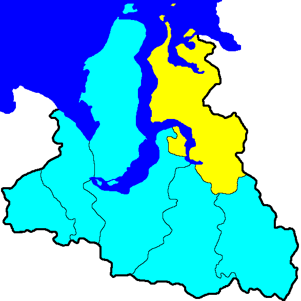 Тазовский район на карте Ямало-Ненецкого АО